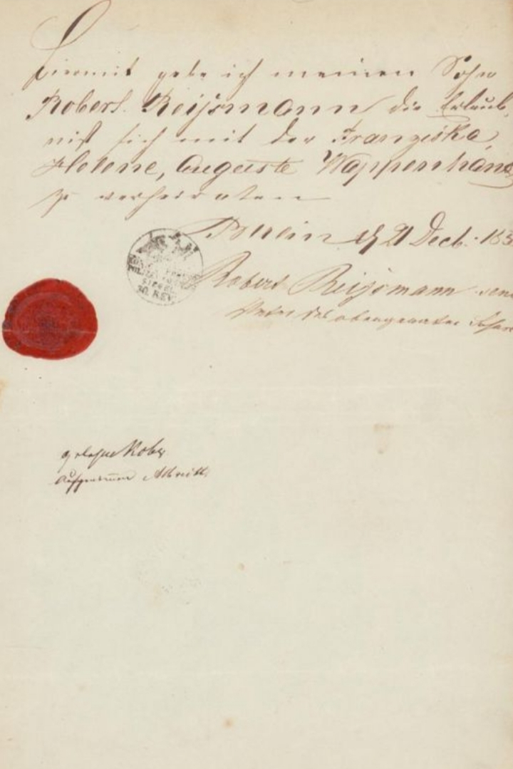 [Heiratserlaubnis]. "Hiermit gebe ich meinen (sic!) Sohn Robert Reijsmann die Erlaubniß sich mit der Franziska Helene Auguste Wappenhand zu verheiraten. / Berlin d. 21. Decb. 1858 / Robert Reijsmann senio(r) / Vater des obengena(nn)ten Sohnes". 2 Amtsvermerke links unter dem Siegel: "gelesen Kober/ aufgenommen Albrecht"